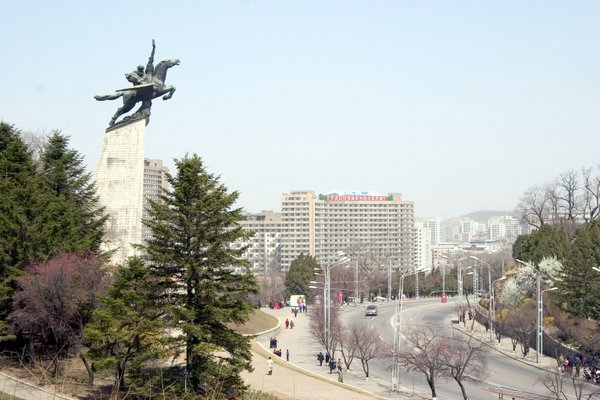 tchholima in Pyongyan